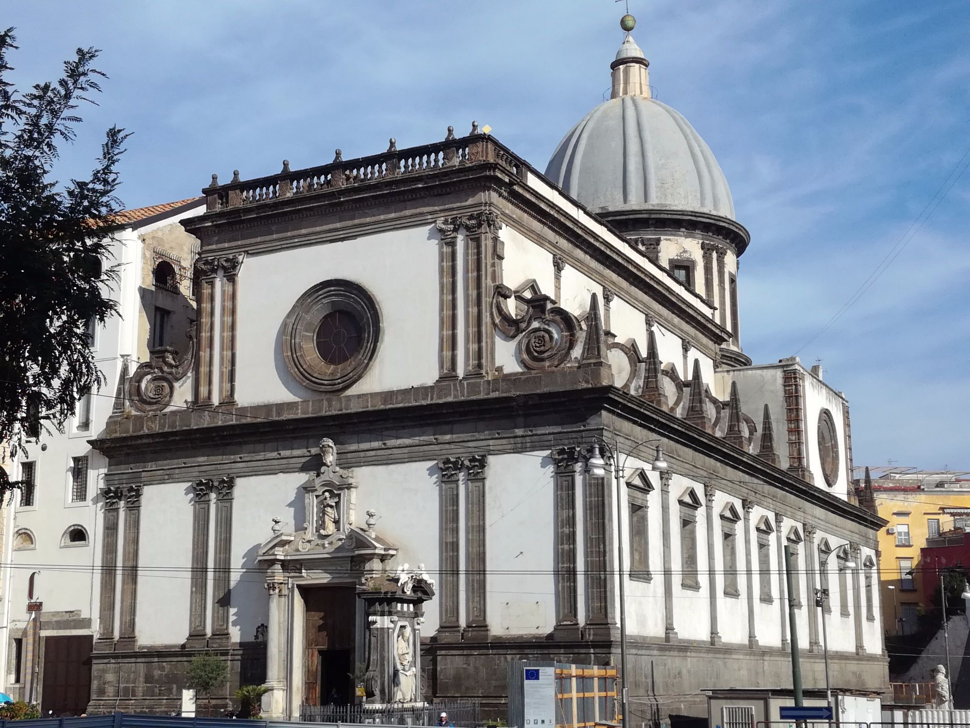 Caterina a Formiello